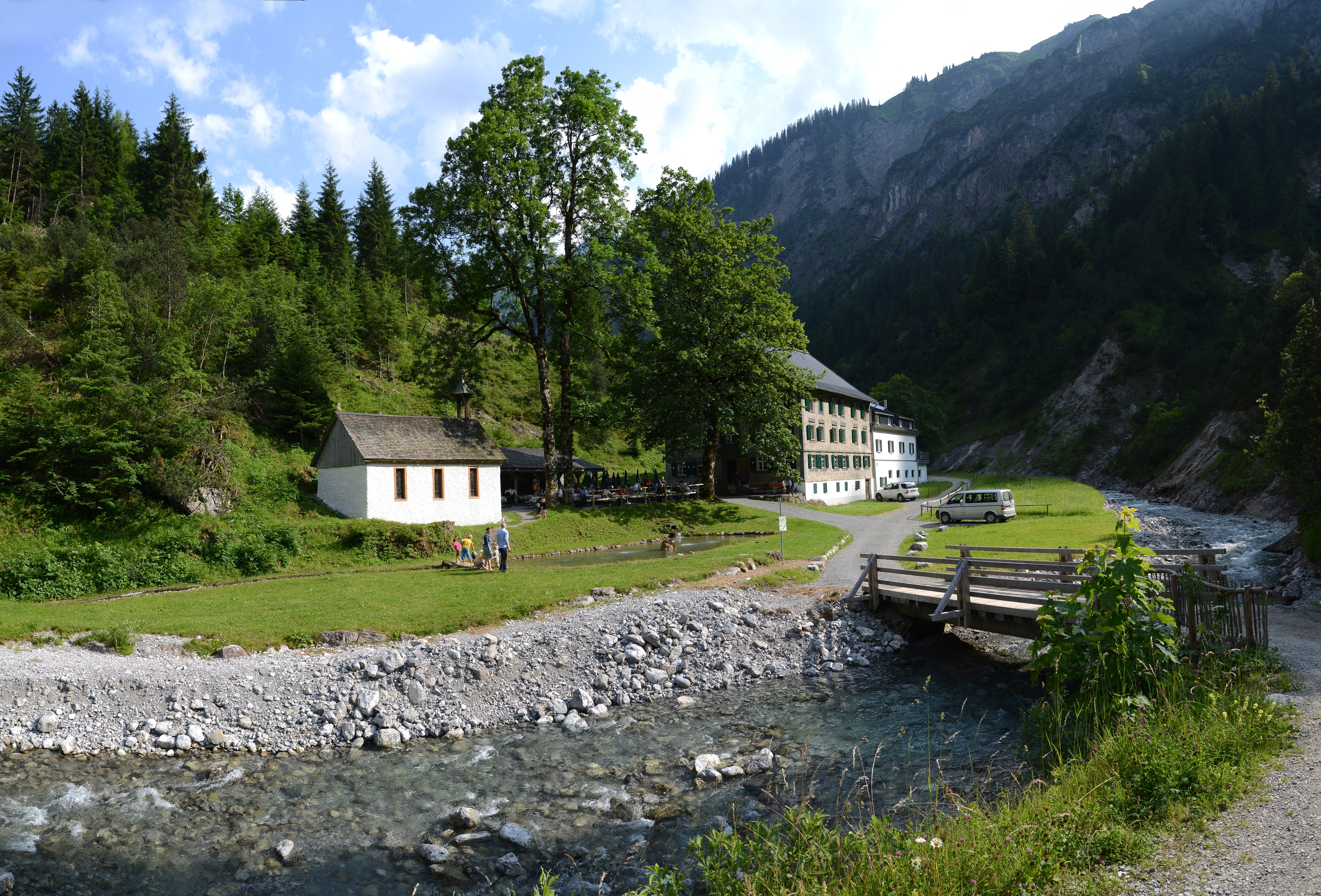 Bad Rotenbrunnen mit Mariahilfkapelle, Buchboden 29 im Gadental (einem Natura 2000-Europaschutzgebiet).